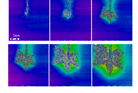 Sekuen waktu (Kiri-Kanan-Bawah) pertumbuhan nukleus es yang diamati dengan sinar-γ